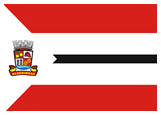 Bandeira do município de Alagoinhas, Bahia, Brasil.